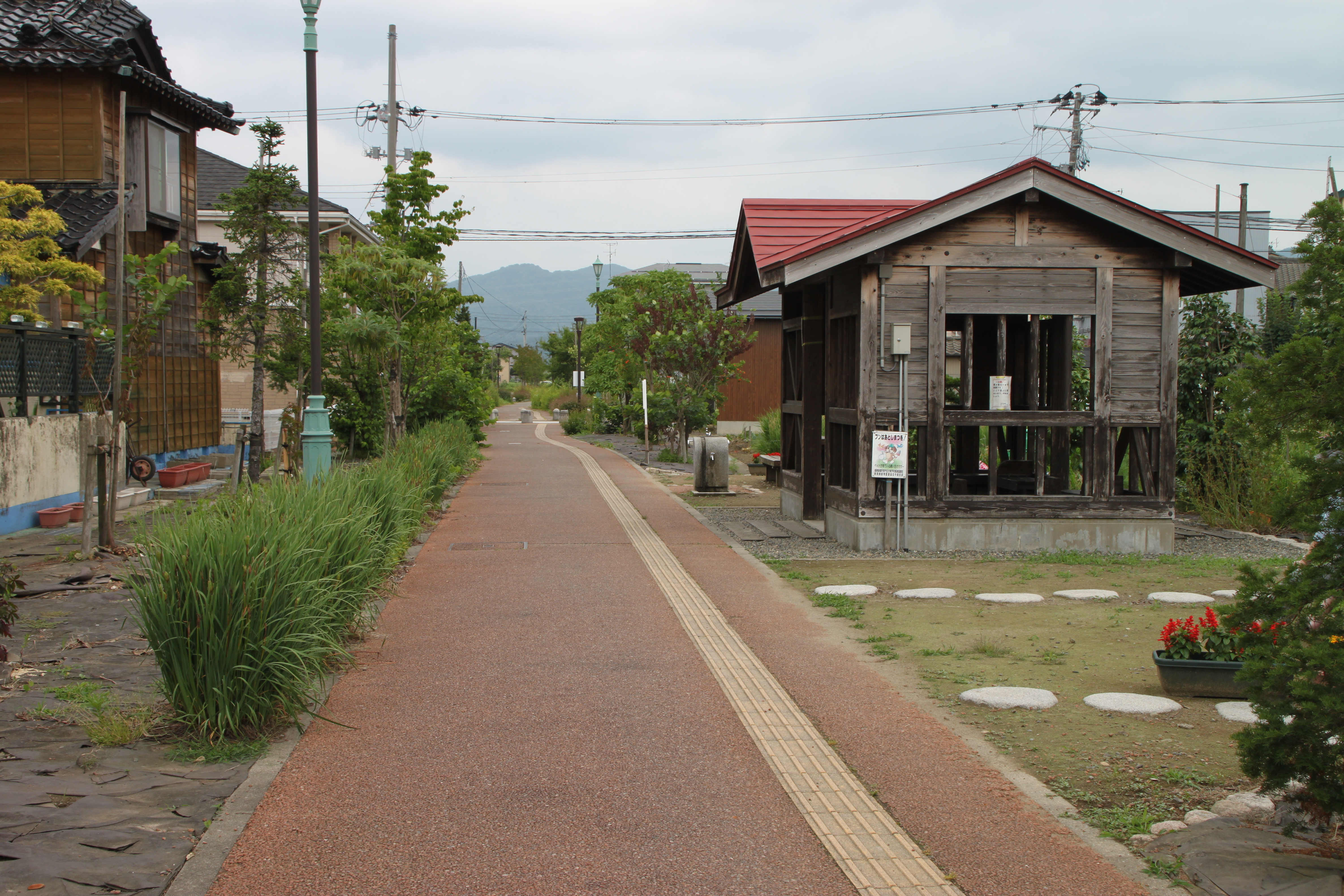 栃尾鉄道下新保駅跡。栖吉川橋梁から続く「ふれあい緑道」の終点近くにある休憩所。写真右側にホームがあった。